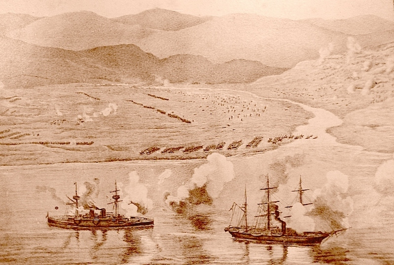 Batalla de Concón, Chile. 21 de agosto de 1891.